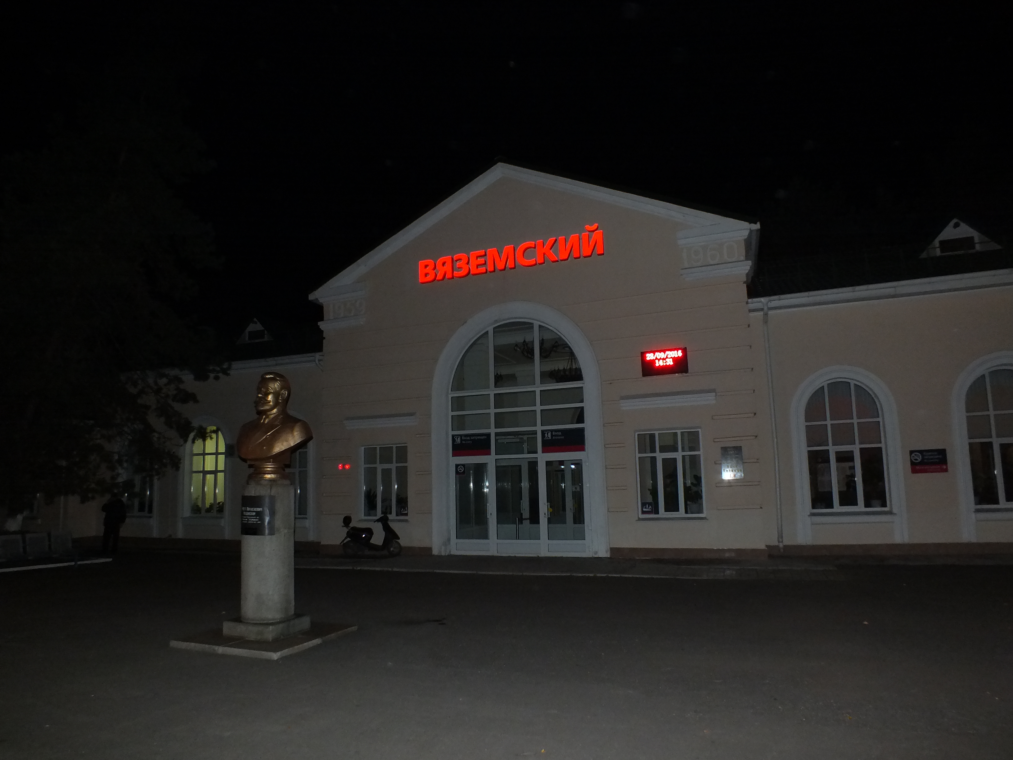 Железнодорожный вокзал станции Вяземская ночью